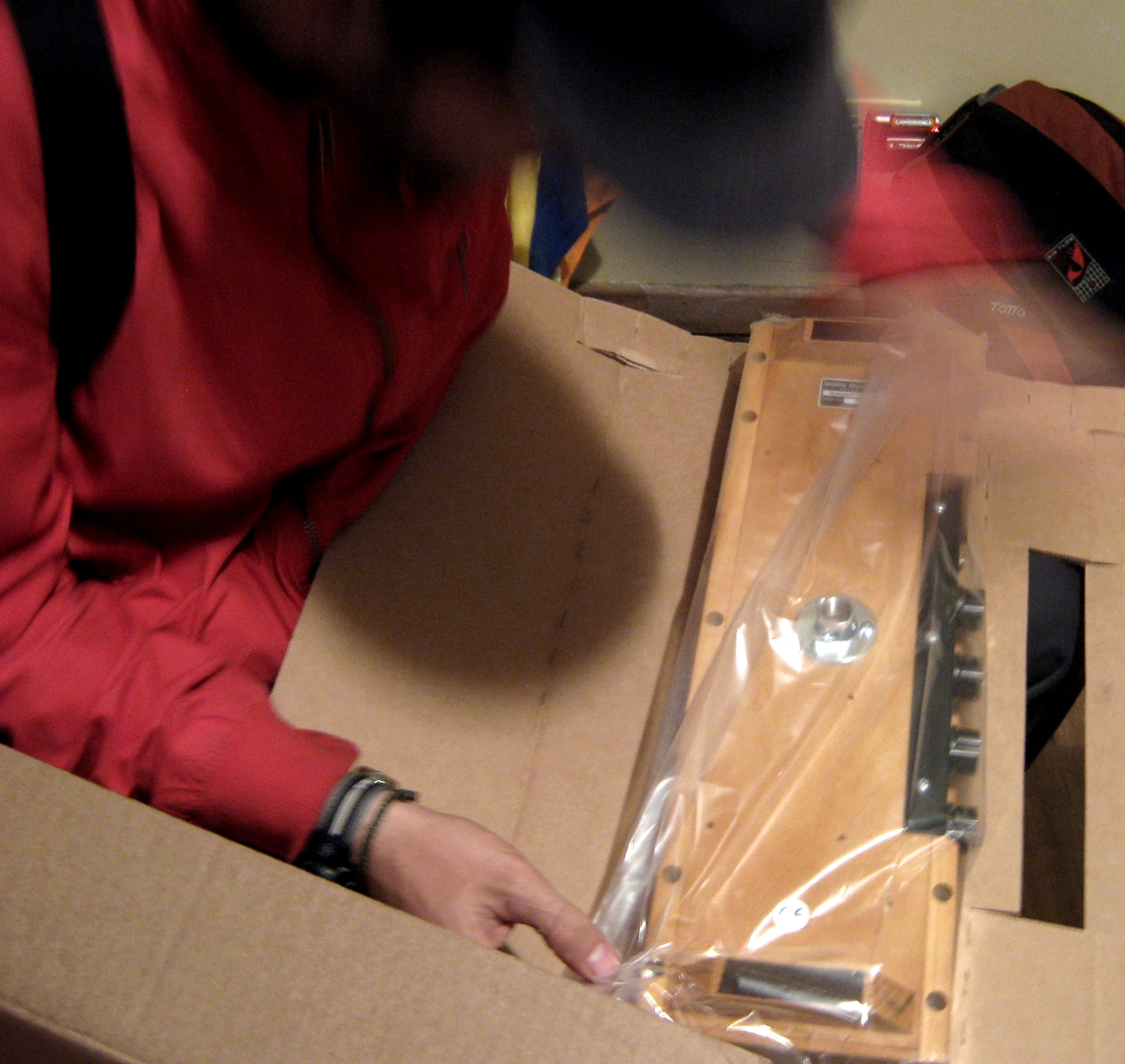 unboxed en bolsa